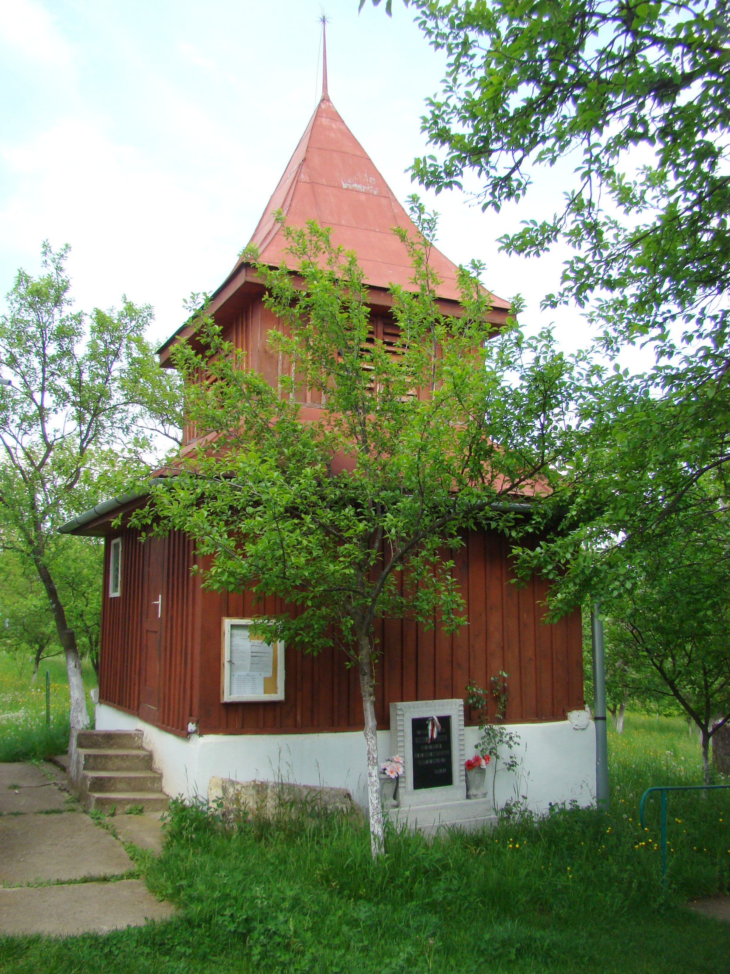 Clopotnița bisericii reformate, sat Pălatca; comuna Pălatca, județul Cluj 02